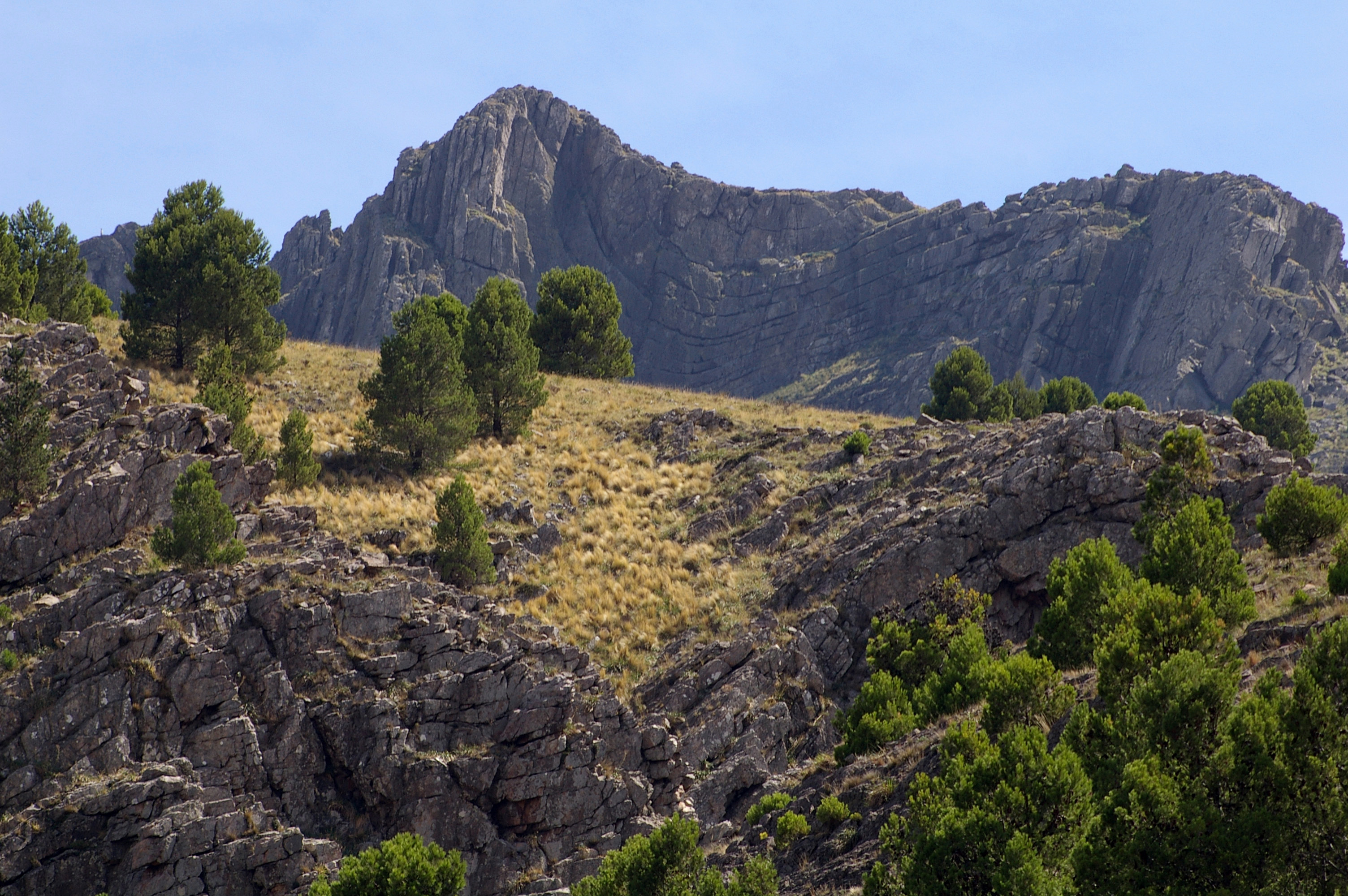 Vista de la Sierra la Ventana, Provincia de Buenos Aires, Argentina. Se observa un pliegue geológico en el fondo.